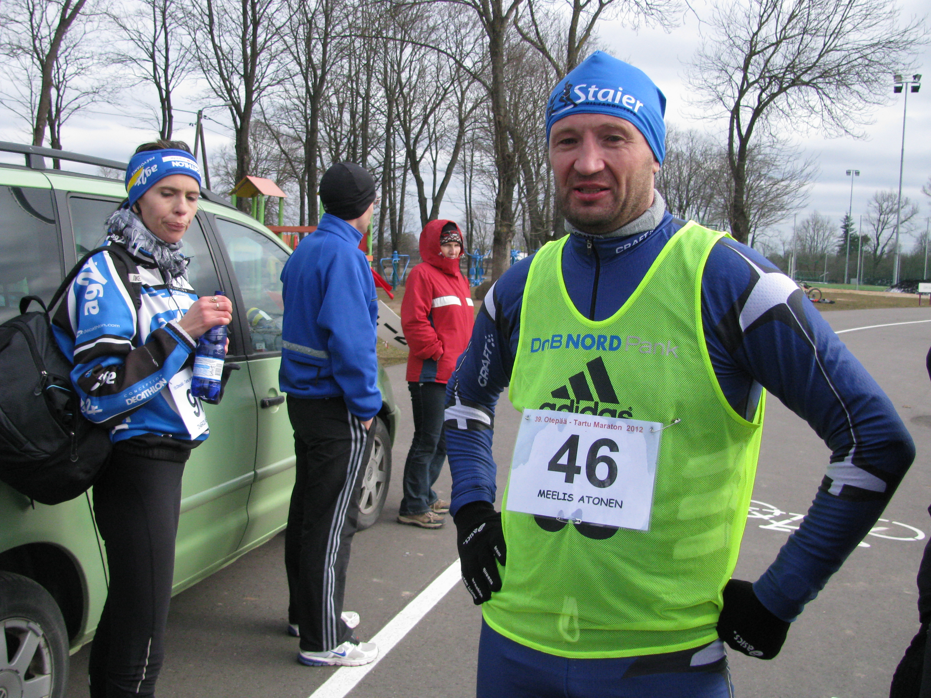 Endine poliitik ja tänane maratoonar Meelis Atonen (Eesti meestest kõige rohkem maratone jooksnu, peaks olema 100 täis)